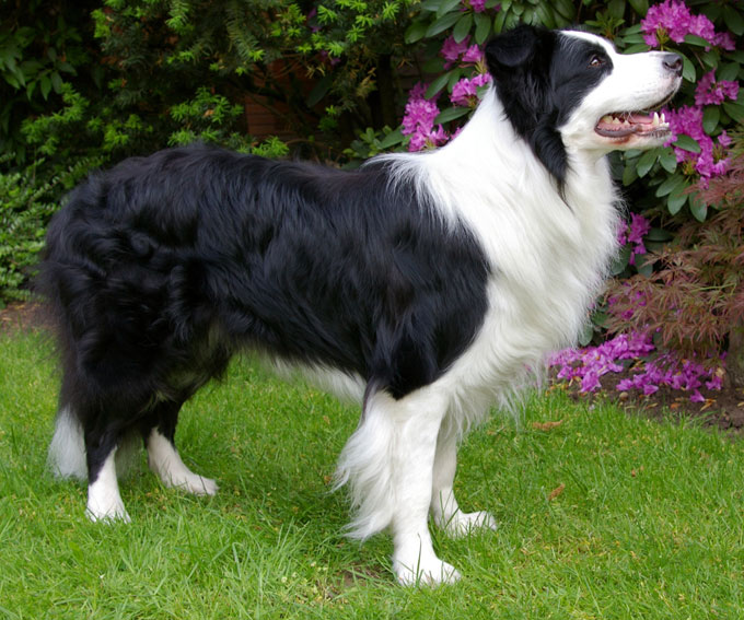 2 jähriger Border Collie Rüde